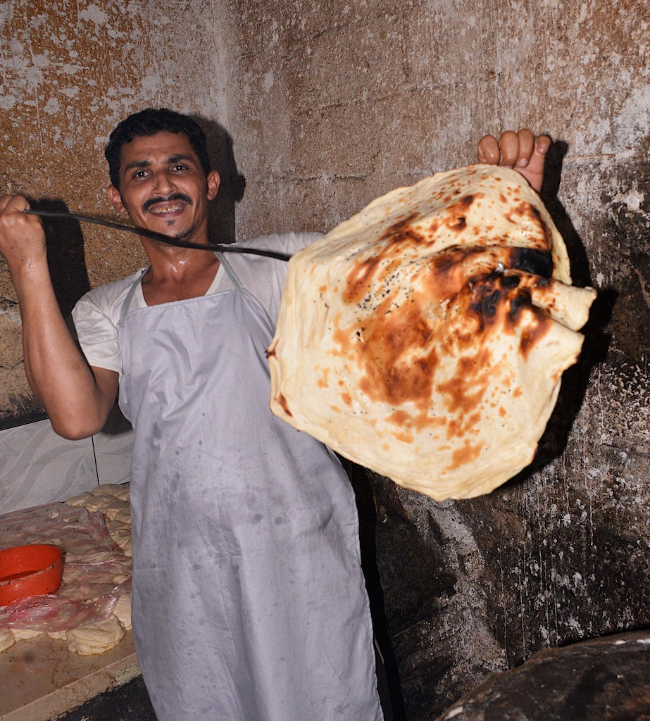 Flat Bread, Hodaidah, Yemen